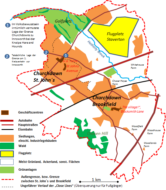 Übersichtskarte von Churchdown mit Legende